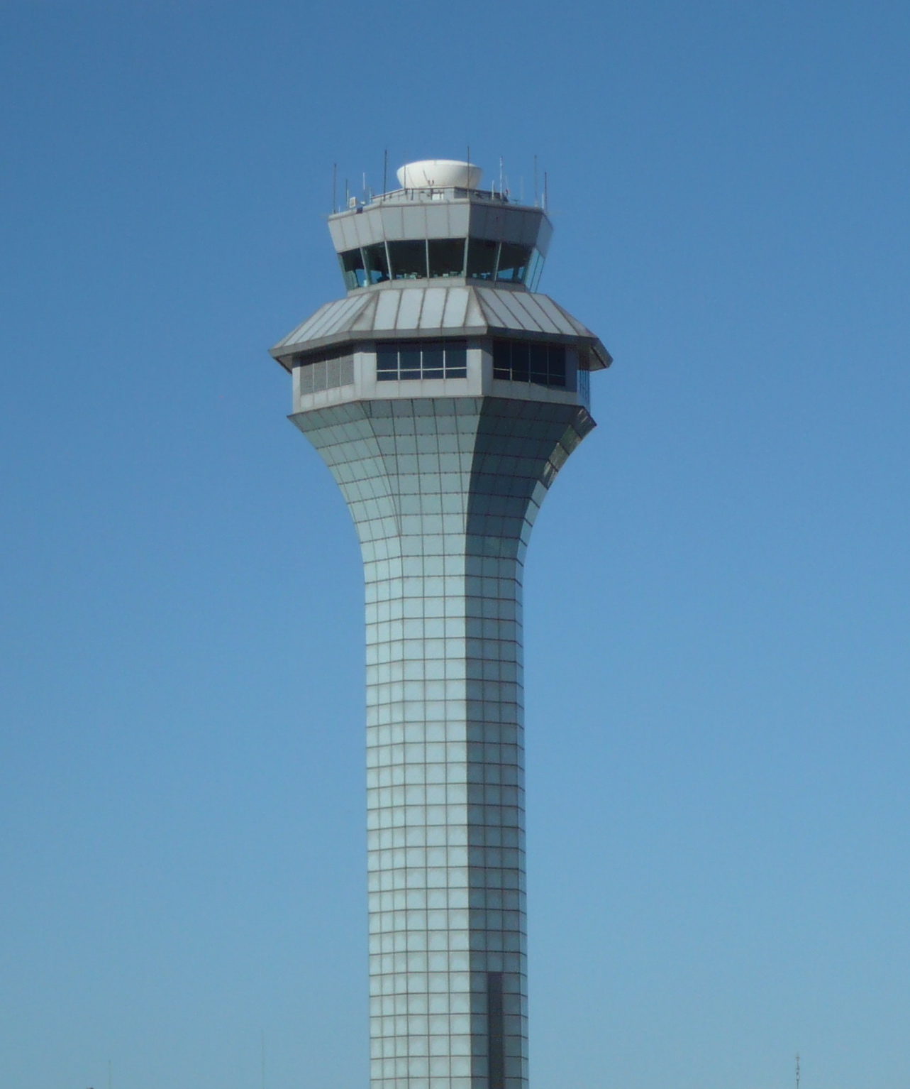 Nördlicher Tower des Flughafen Chicago O'Hare